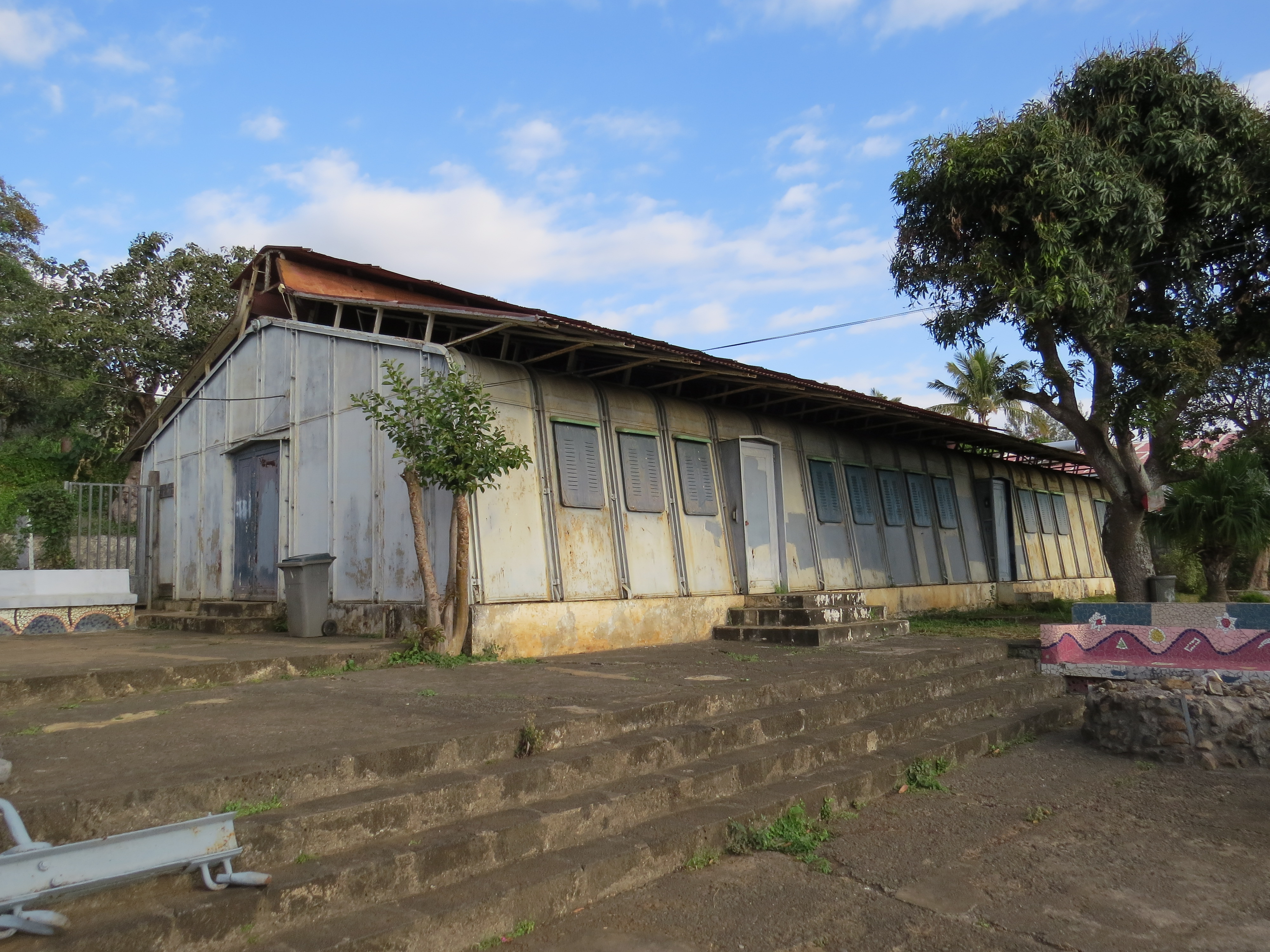 Situé près de l'usine sucrière de Vue Belle, La Saline, Saint-Paul de la Réunion. Inscrit aux MH en 2016. .